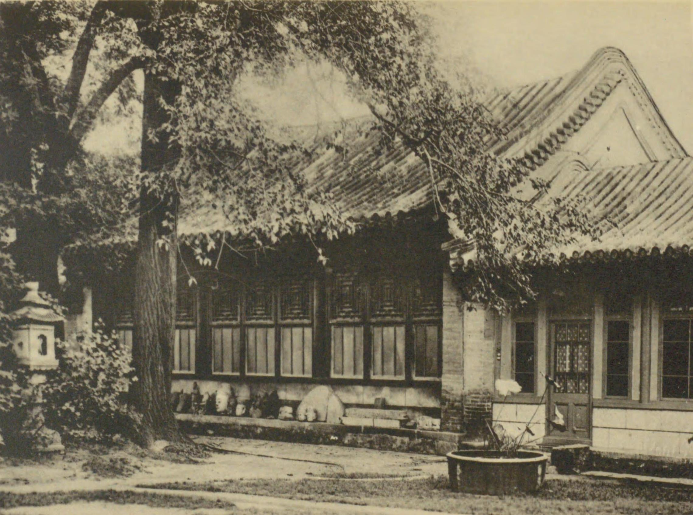 山中商会北京支店